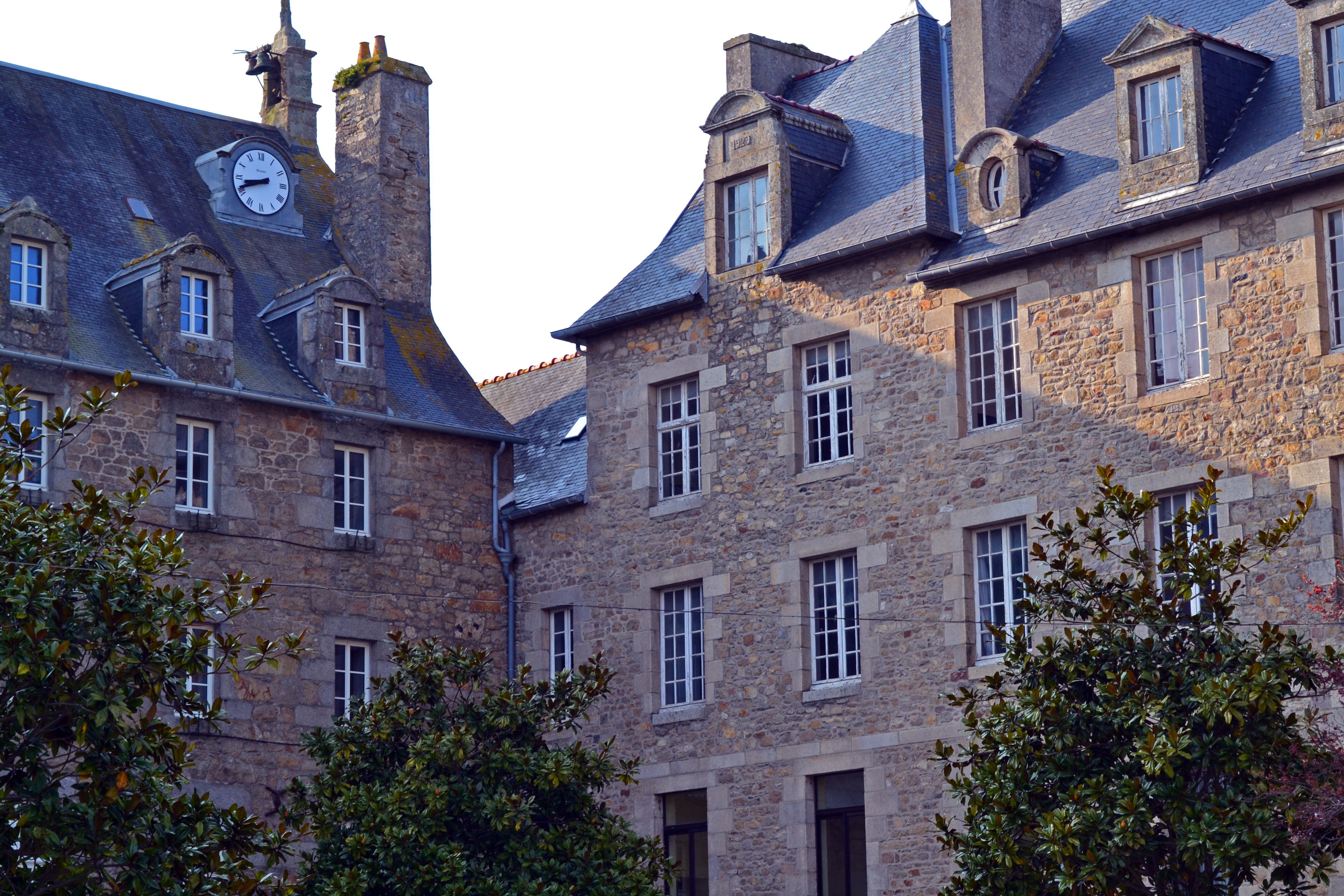 Bâtiments historiques au niveau de la cour d'honneur du lycée N-D du Kreisker à Saint-Pol-de-Léon